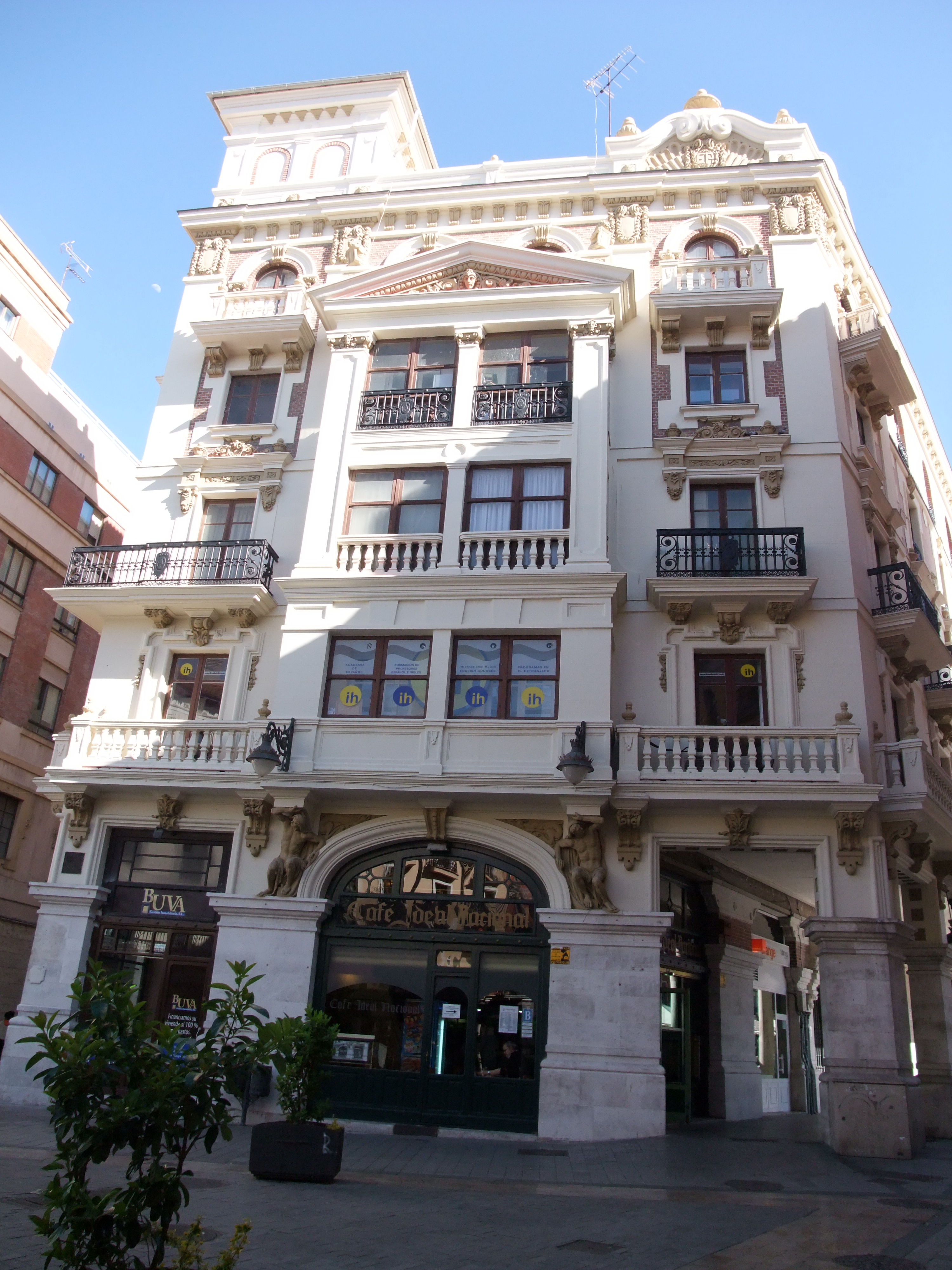 Valladolid-Plaza del Corrillo-Café Ideal Nacional-1